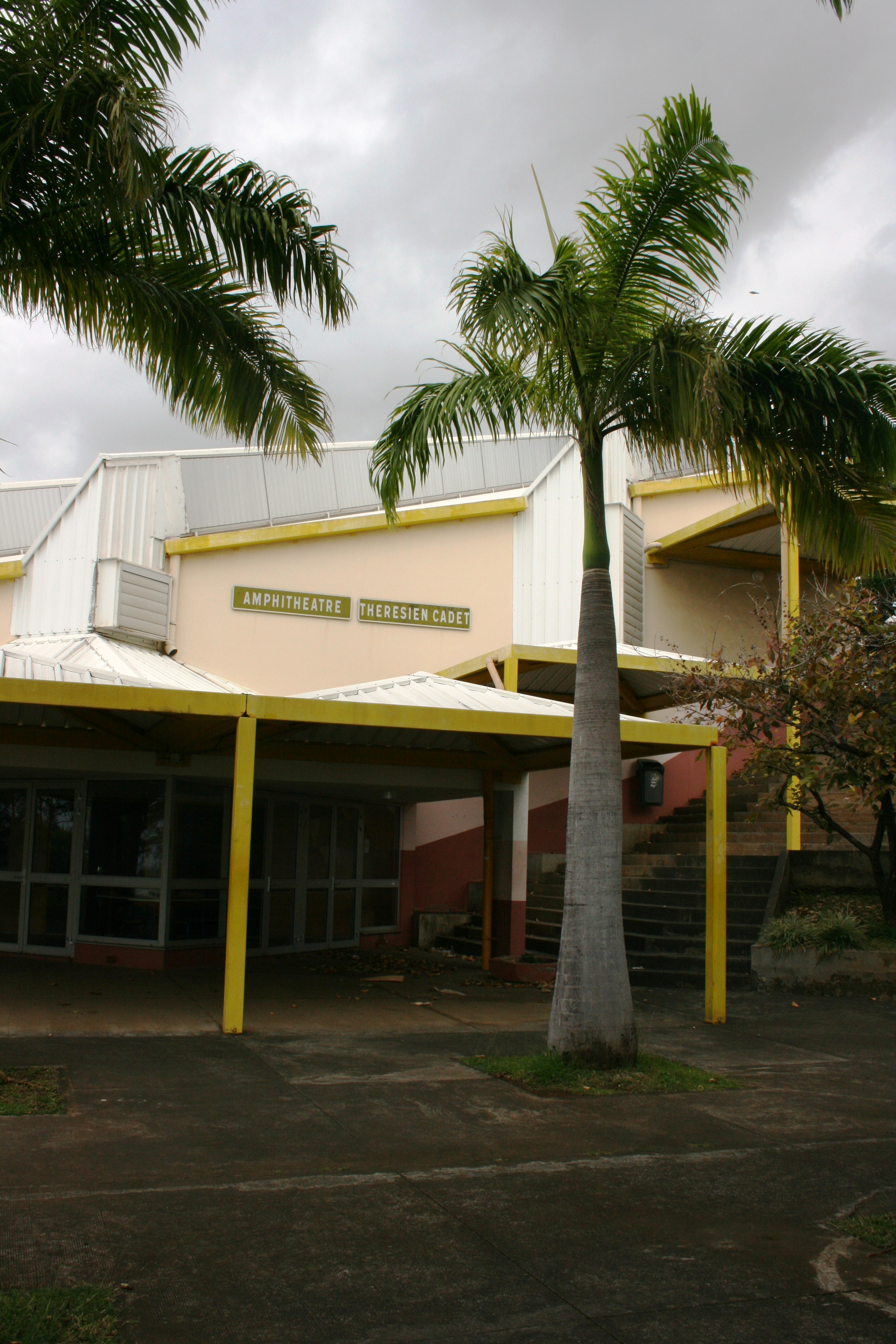 L'entrée de l'amphithéâtre Thérésien Cadet, à Saint-Denis de la Réunion